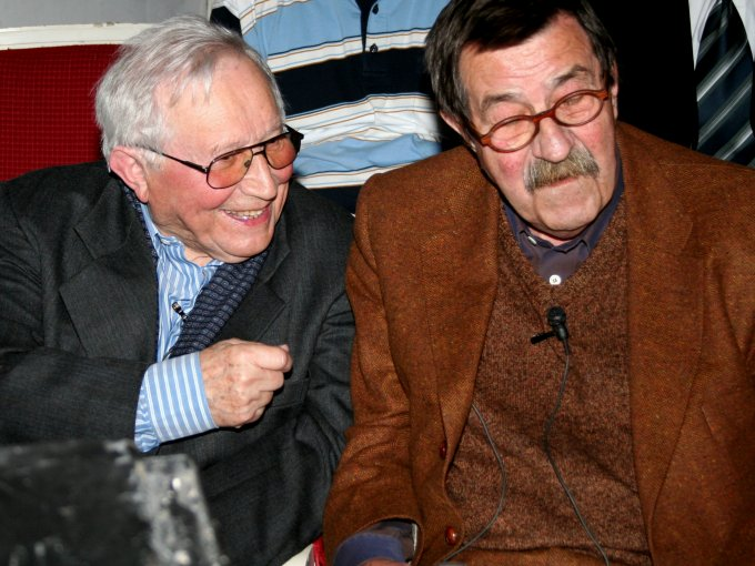 Tadeusz Różewicz, Polish poet; Günter Grass, German writer; 51 MTK Warsaw